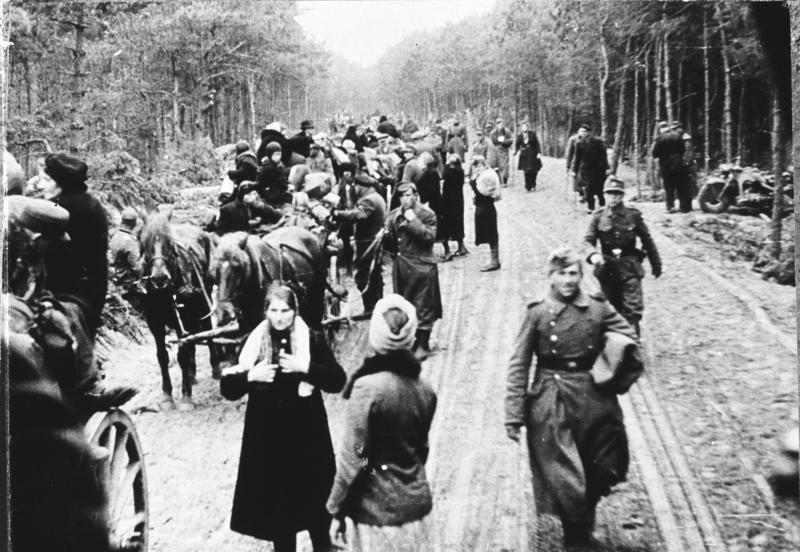 Flüchtlingtreck im Raum von Braunsberg (Ostpreußen), 1945